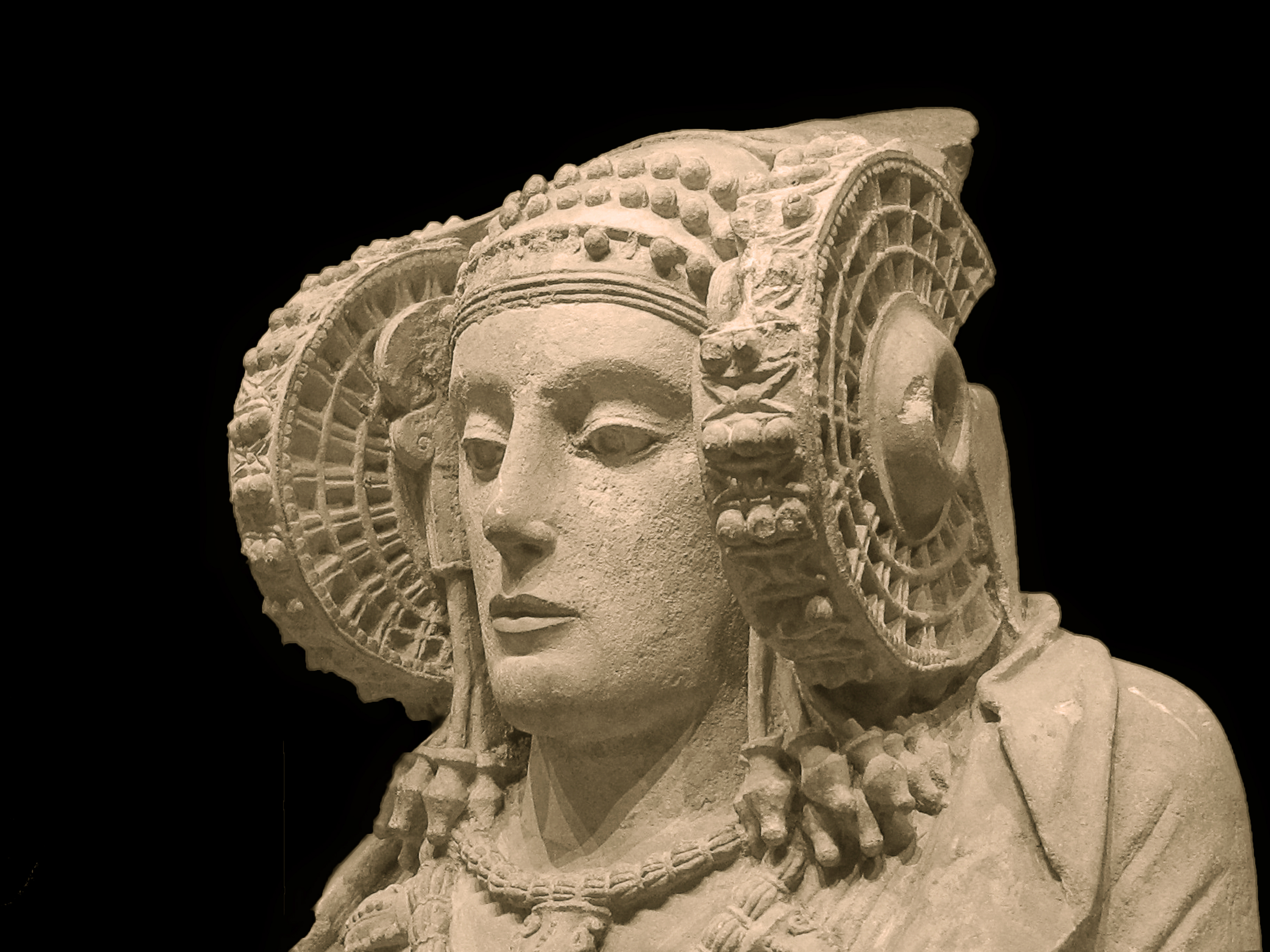 ======================== La Dama de Elche es la escultura más representativa del arte ibérico, una de las más significativas de todo el Mediterráneo. Datada hacia el siglo IV antes de nuestra era, representa una mujer cuyos atributos han dado lugar a toda una serie de conjeturas aún no concluidas No existe escrito alguno, detallando ese tipo de vestimenta , que es extraordinaria y fuera del uso común la decoración sobre la cabeza de esa escultura Según una hipótesis, La Dama fue una figura de cuerpo entero sentada y con una policromía bien definida de rojos y azules. En los últimos análisis se descubrió un pequeño fragmento de pan de oro en uno de los pliegues de la espalda. Esto induce a suponer que las joyas de la escultura estaban recubiertas de pan de oro. Podría haberse tratado inicialmente de una imagen de culto en posición sedente. Posteriormente, se rompió en dos partes para reutilizar la zona del tronco y transformar la parte dorsal en una urna funeraria. "Museo Arqueológico Nacional"